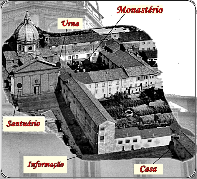 Arte sob prospecto informativo descrevendo o Monastero delle Clarisse di Santa Rosa, com suas edificações e atrações - Viterbo (Itália)